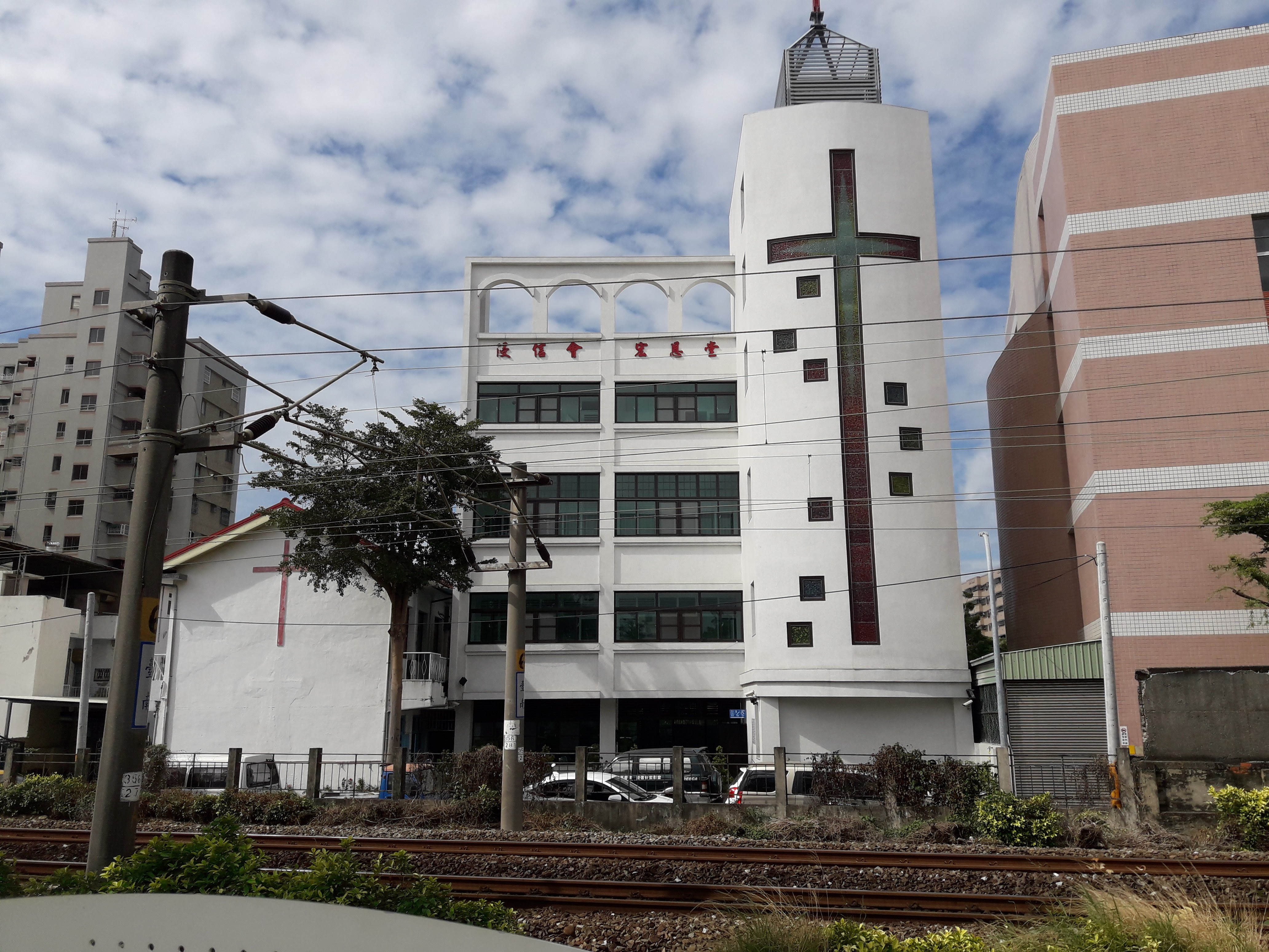 中華基督教台南市浸信會宏恩堂，地址：臺南市北區北門路二段374號。